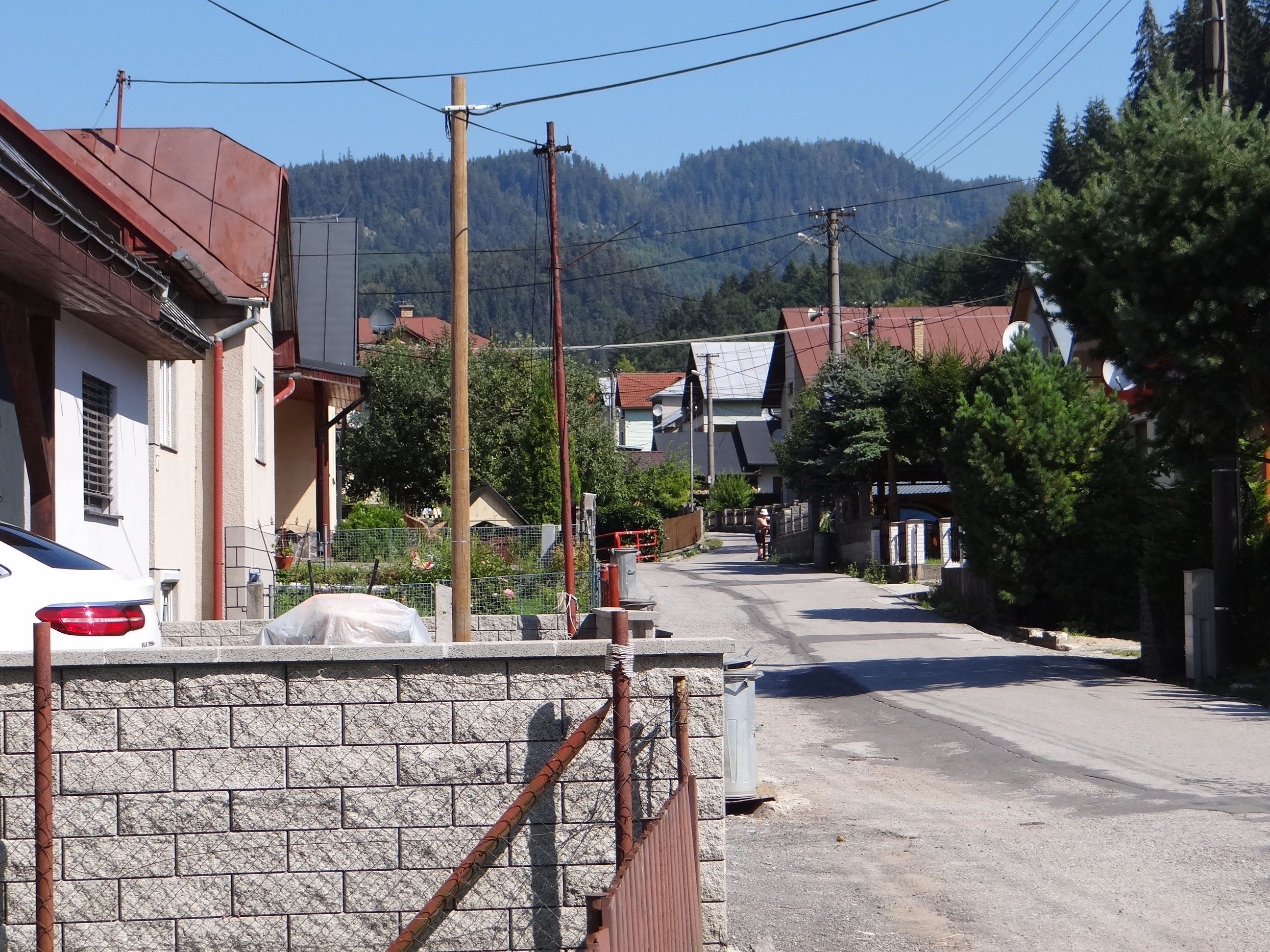 Baláže